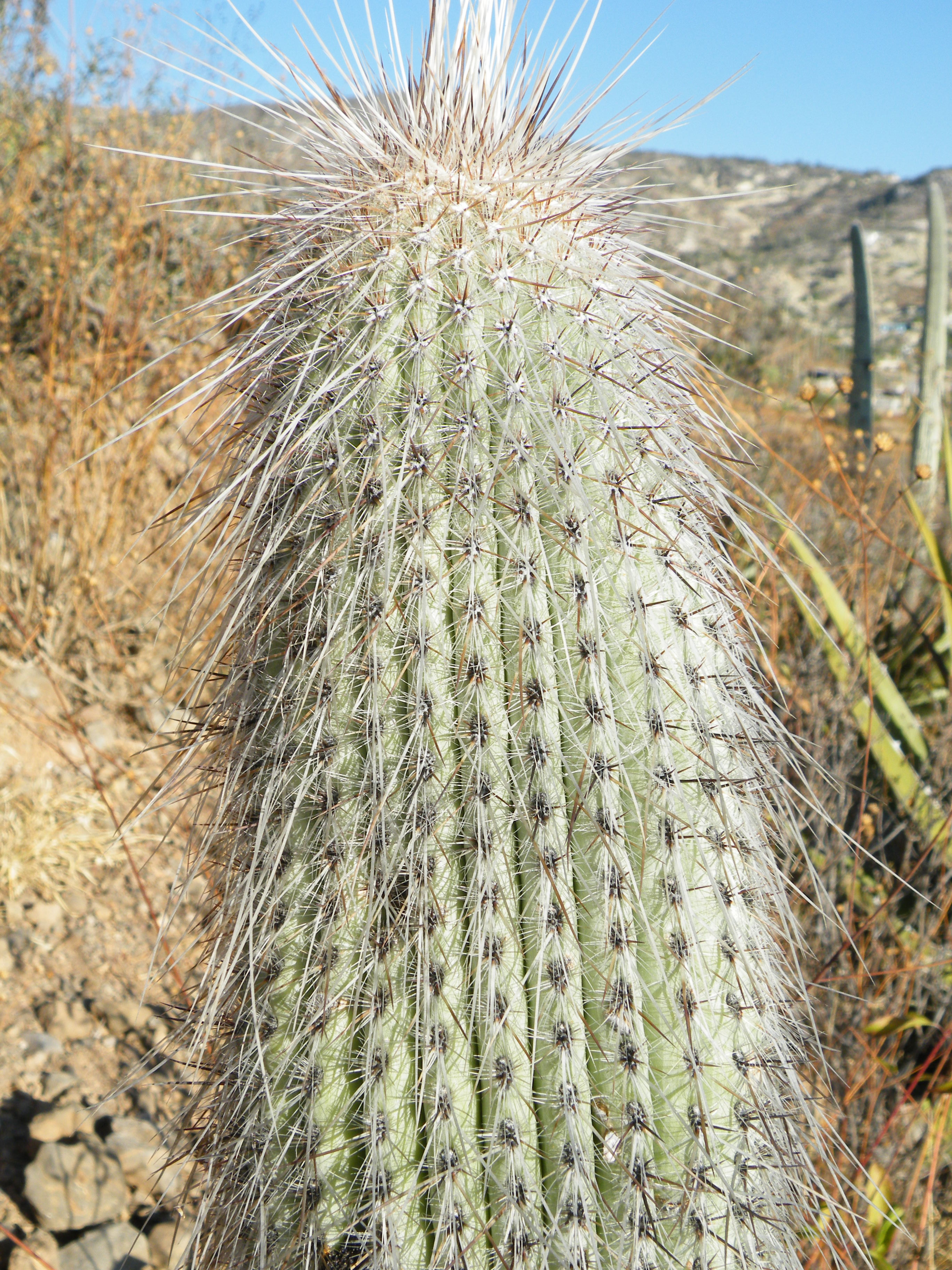 Zapotitlan De Las Salinas, Puebla